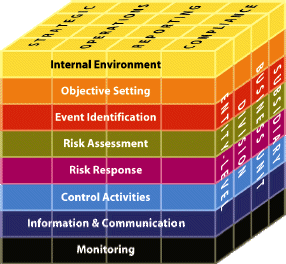 Schematische weergave van het COSO management-model